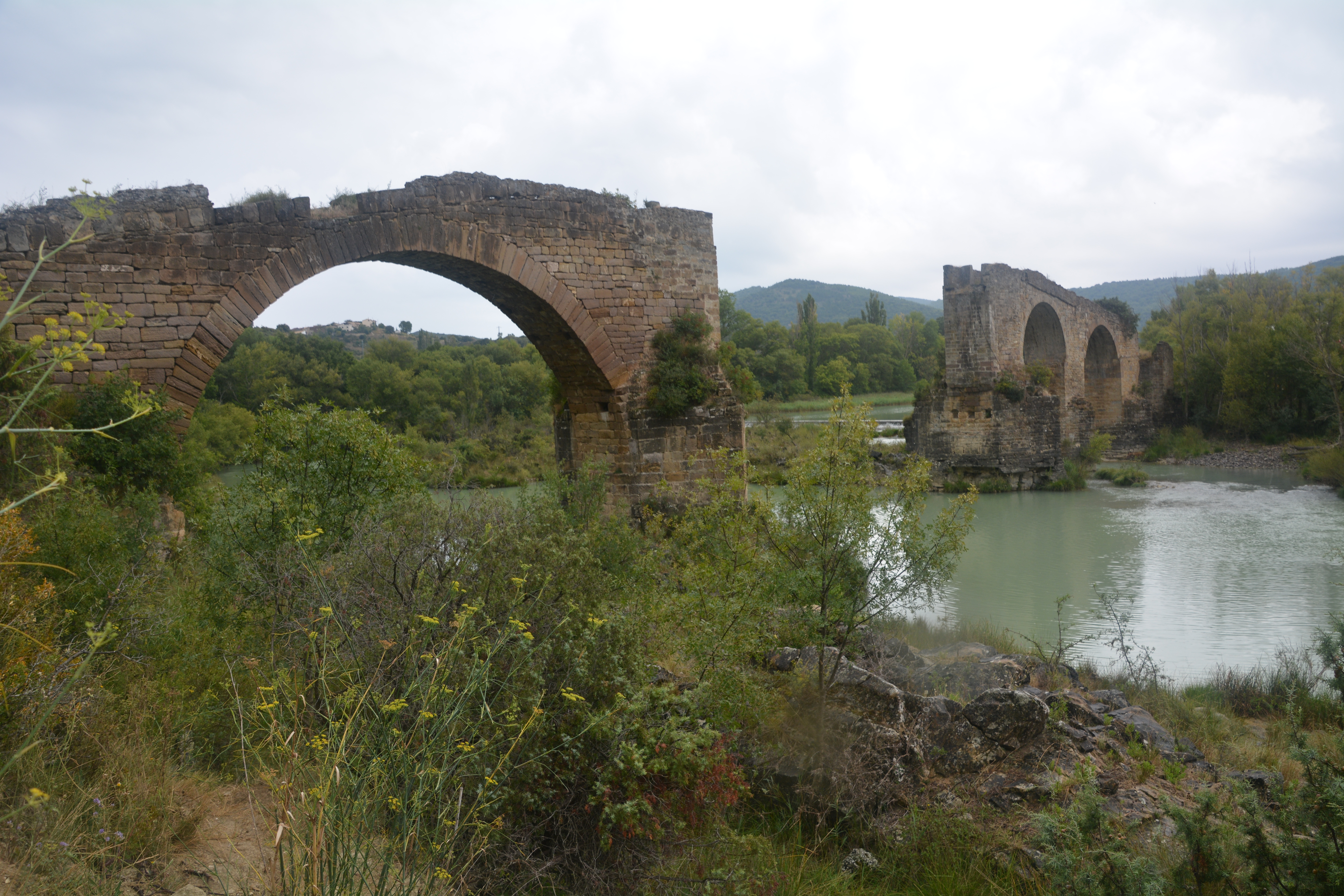 Tramo medio del río Aragón This is a photography of a Special Area of Conservation in Spain with the ID: ES2200030. Natura2000 entry, EEA entry